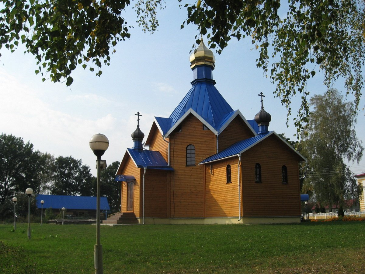 Відамля. Царква